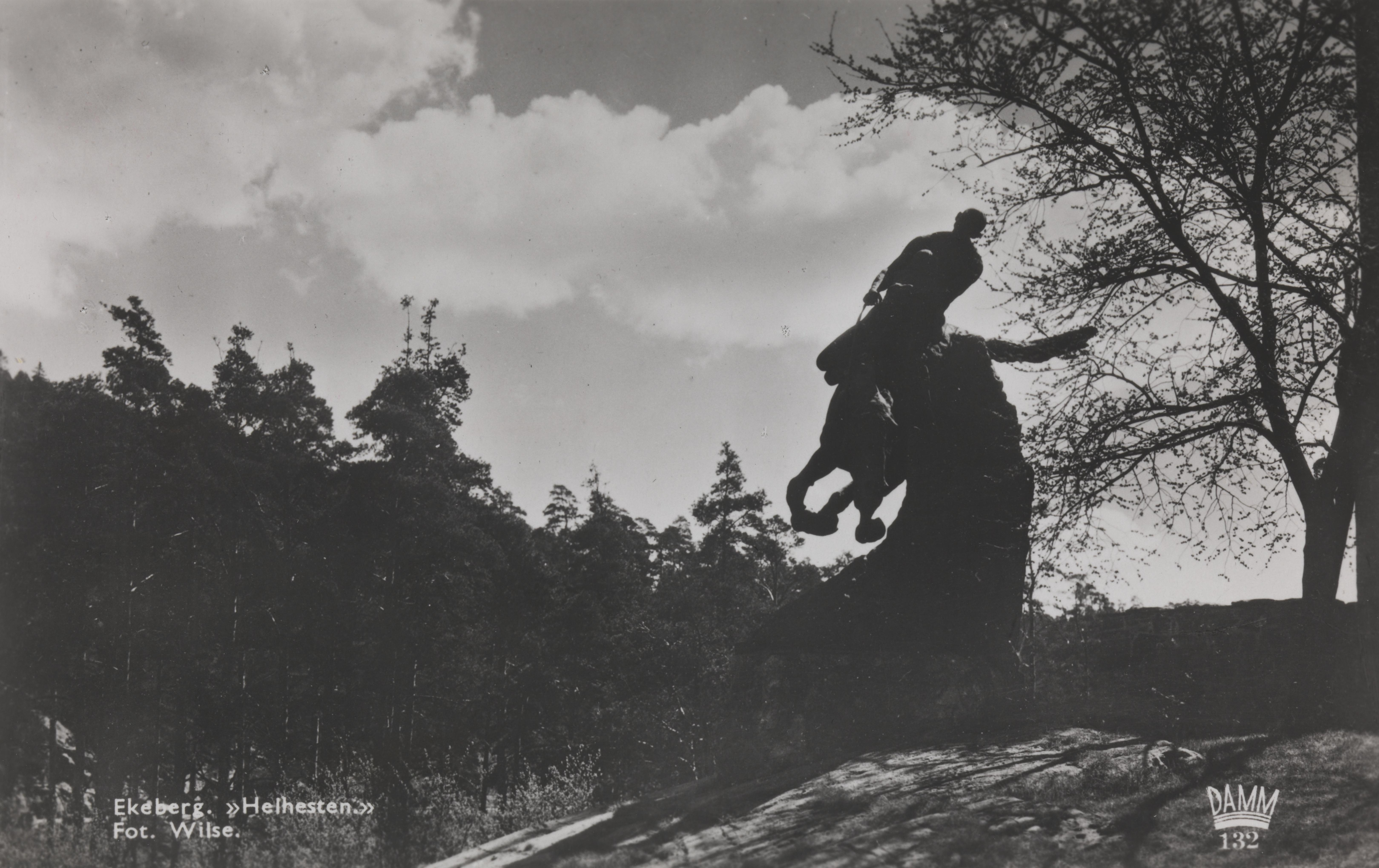 Bildet er hentet fra Nasjonalbibliotekets bildesamling Ekeberg,Sjømannsskolen, Oslo, Oslo